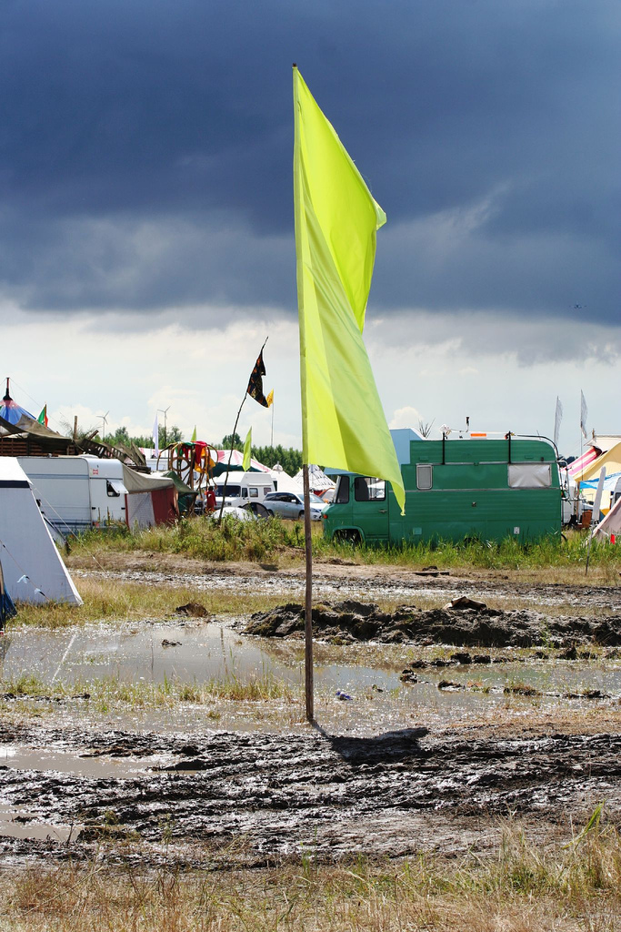 ruigoord 2006 landschapruigoord 2006 landschap